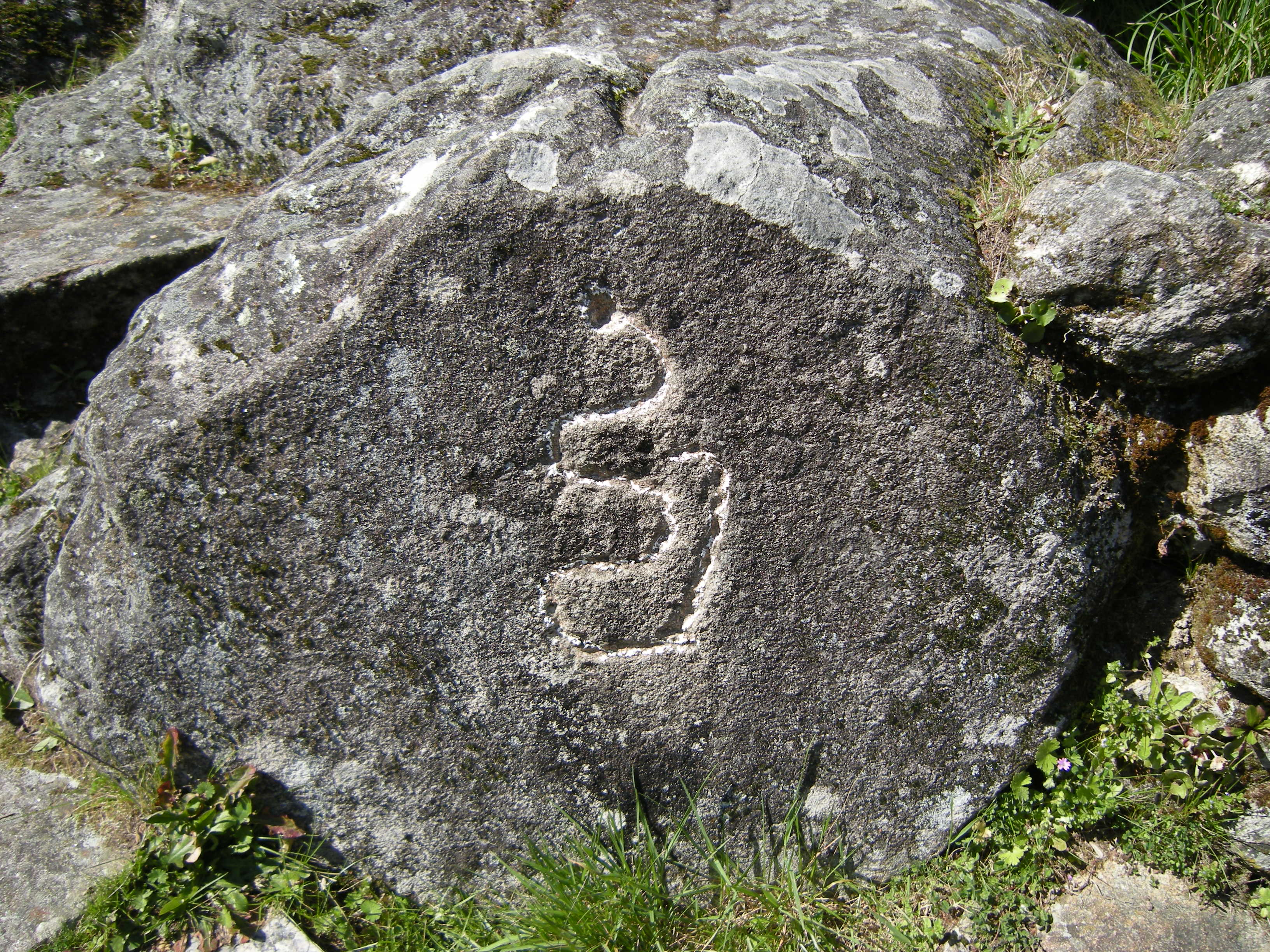 Petroglifo do castro de Troña no concello de Ponteareas na provincia de Ponteveda, Galicia (España).